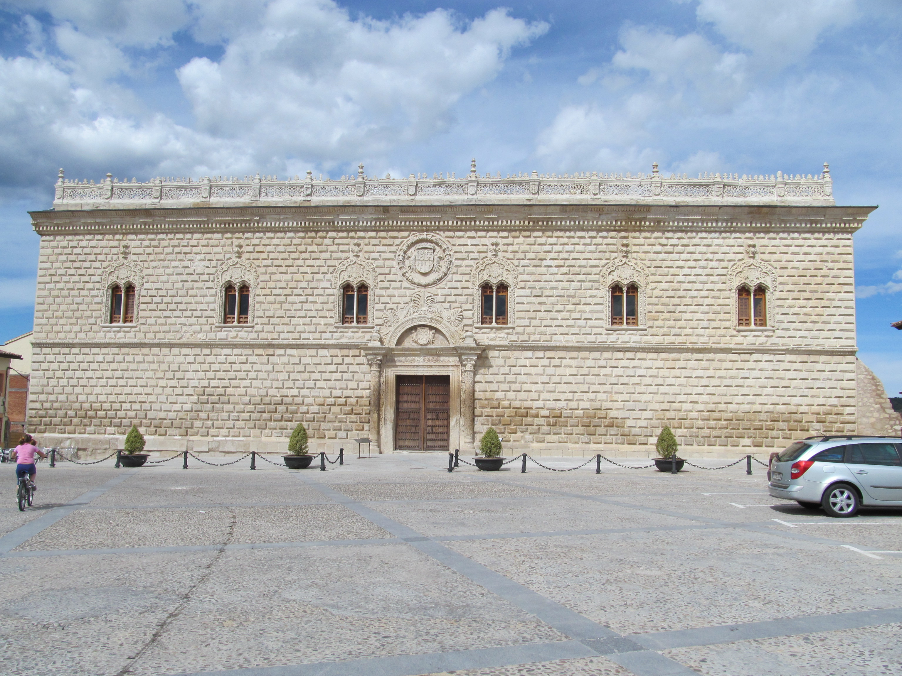 Cogolludo-El palacio de los Duques de Medinaceli o Palacio Ducal de Cogolludo es un palacio renacentista. Su construcción finalizada en 1502.